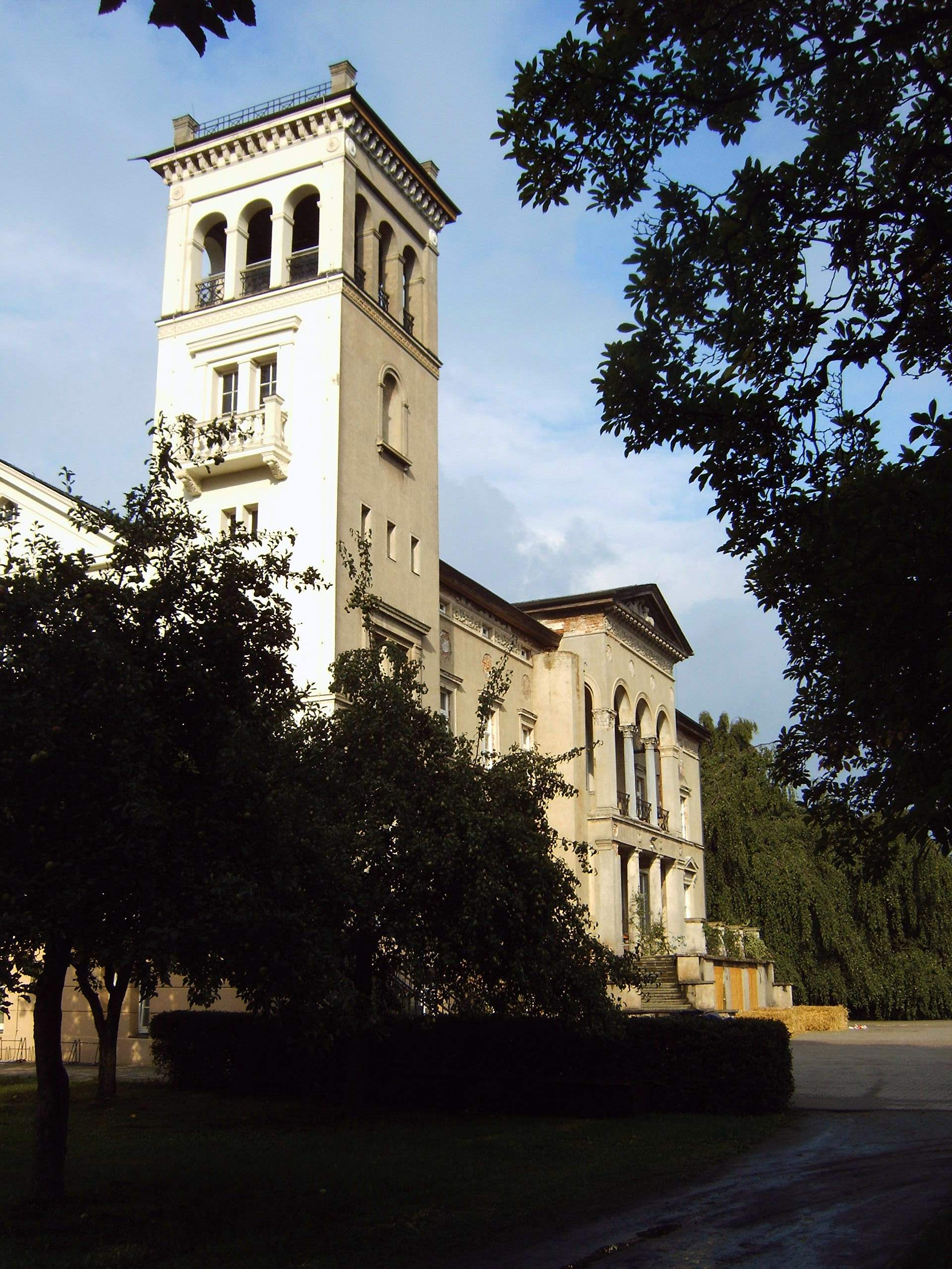 Turm von Schloss Kunrau, Sachsen-Anhalt, Deutschland Bild aufgenommen am 26.8.2006 von Olaf Meister